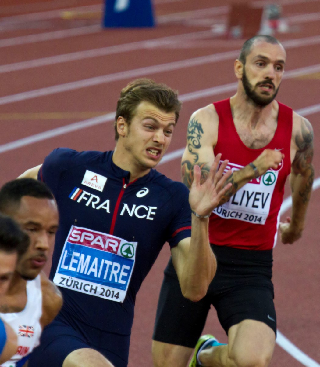 9021 christophe lemaitre halve finales 200m